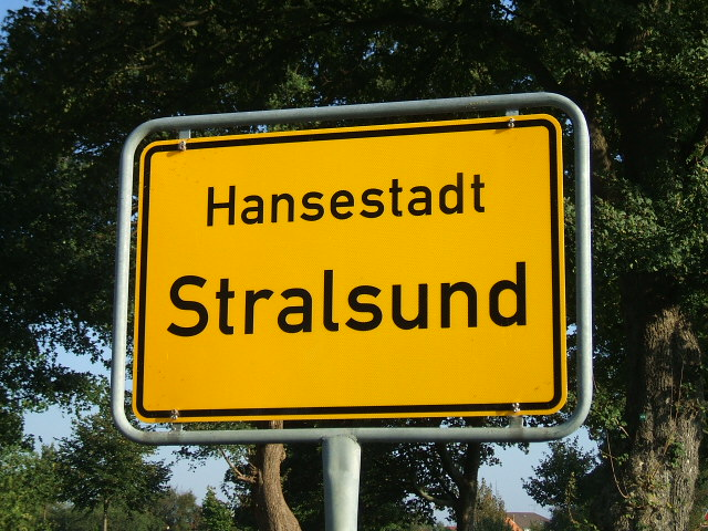 Stralsund,_Germany,_Ortseingangsschild_(2006-09-25)